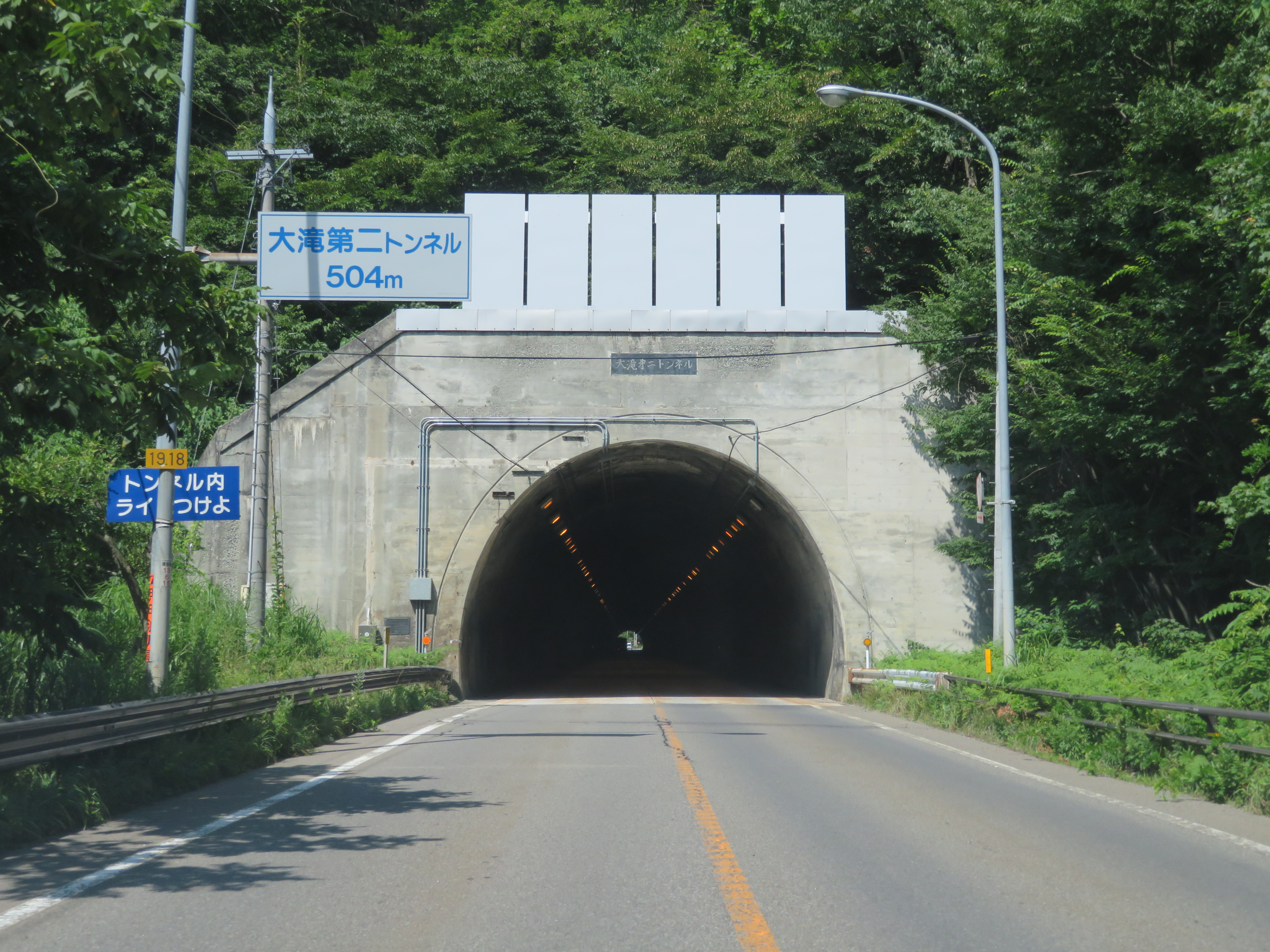 国道13号線大滝第二トンネル（福島市側坑口付近を撮影） Canon PowerShot SX720 HS